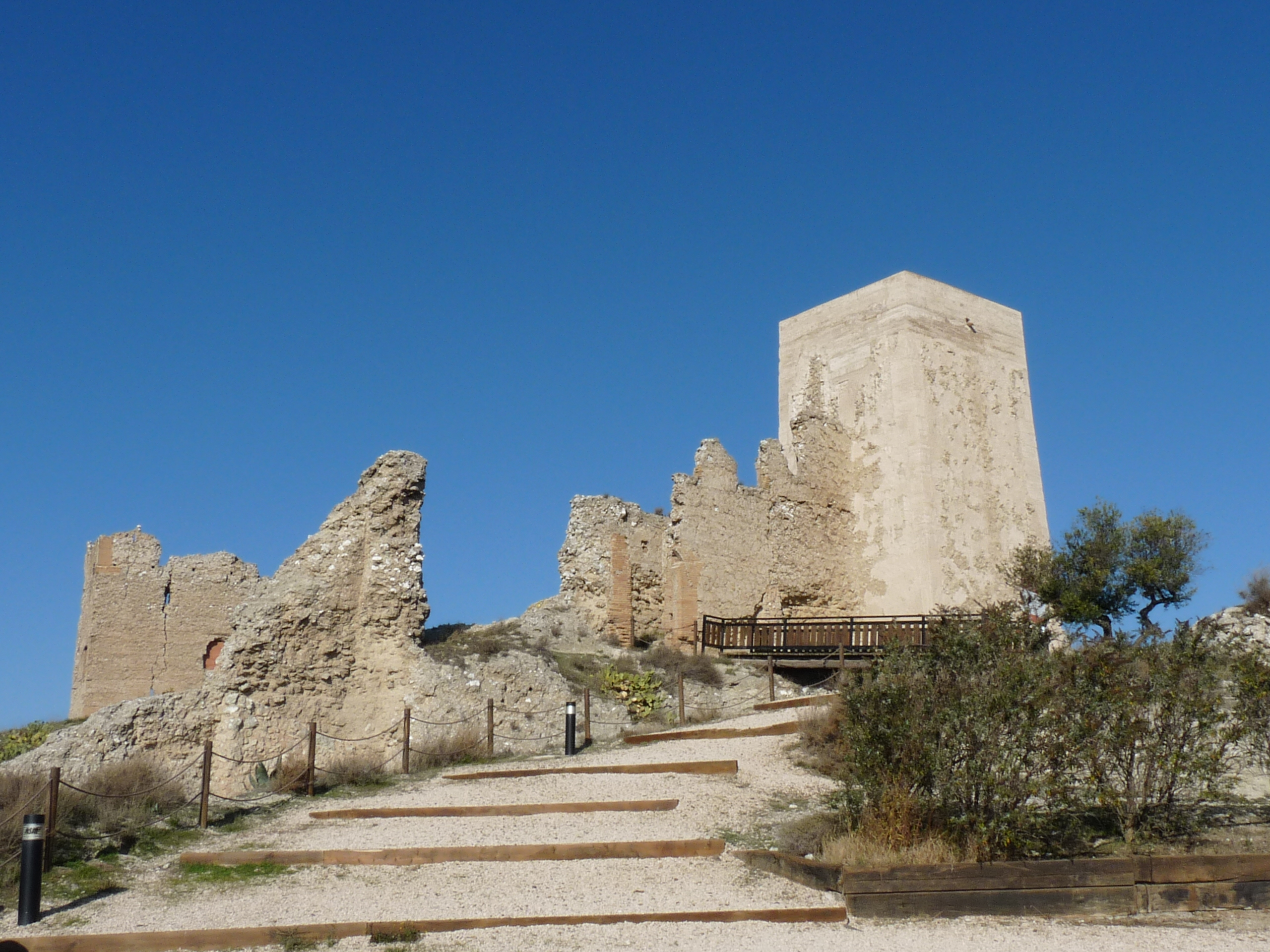 Alfajarín - Castillo s. XI al XIV